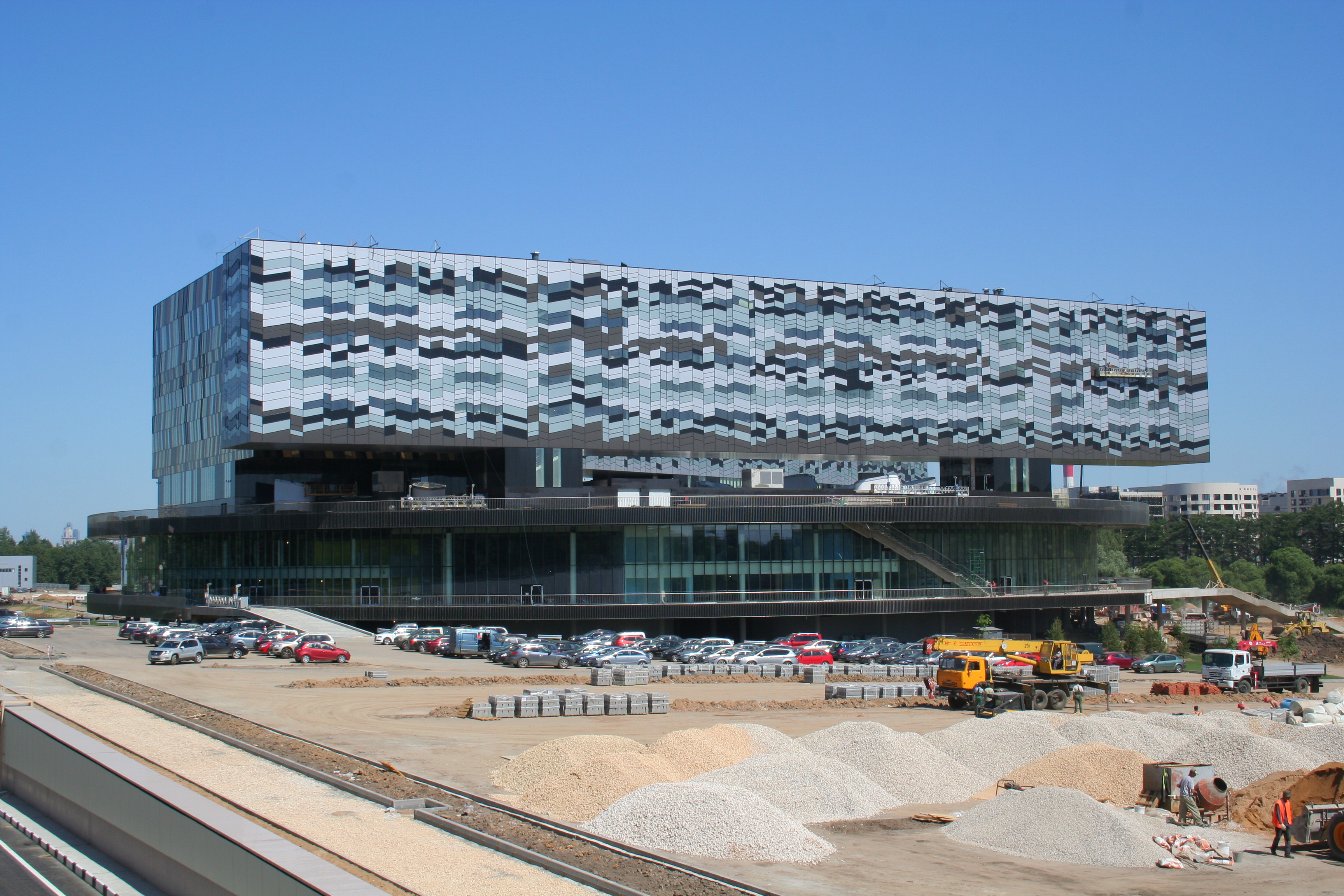 Campus der Managementschule Skolkowo (noch im Bau), Oblast Moskau, Russland.